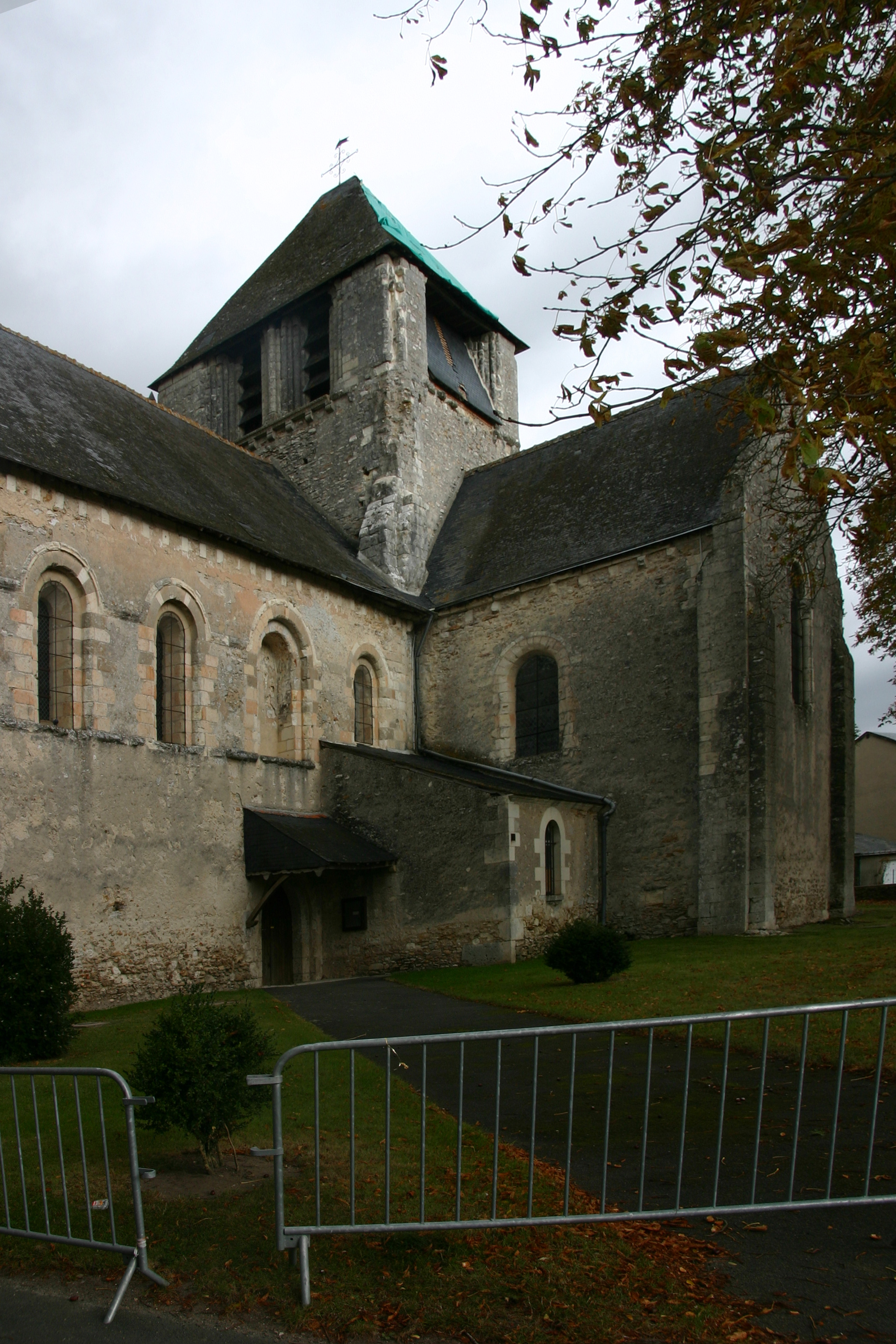 Kirche Notre-Dame-de-Fougeray de Cormery